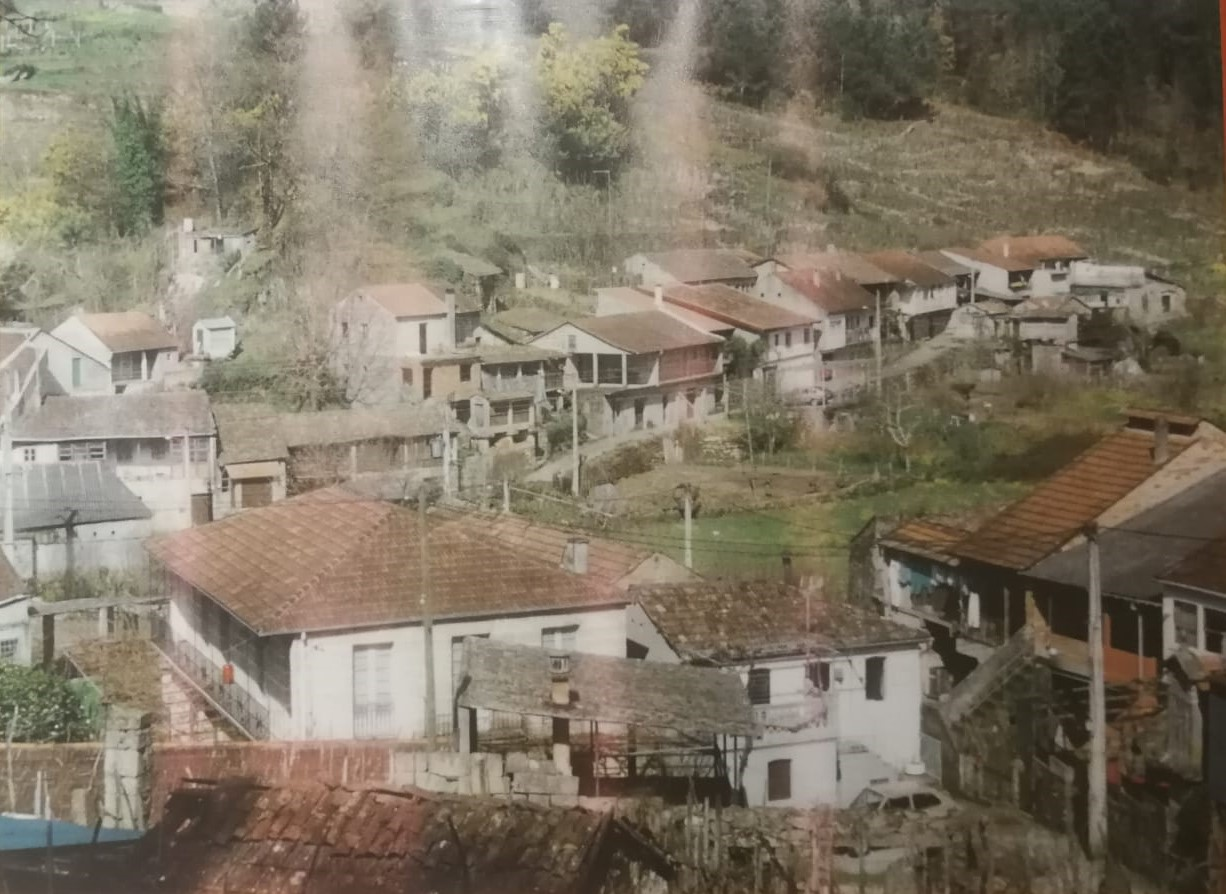 Fotografía panorámica de la aldea de San Fiz do Varón